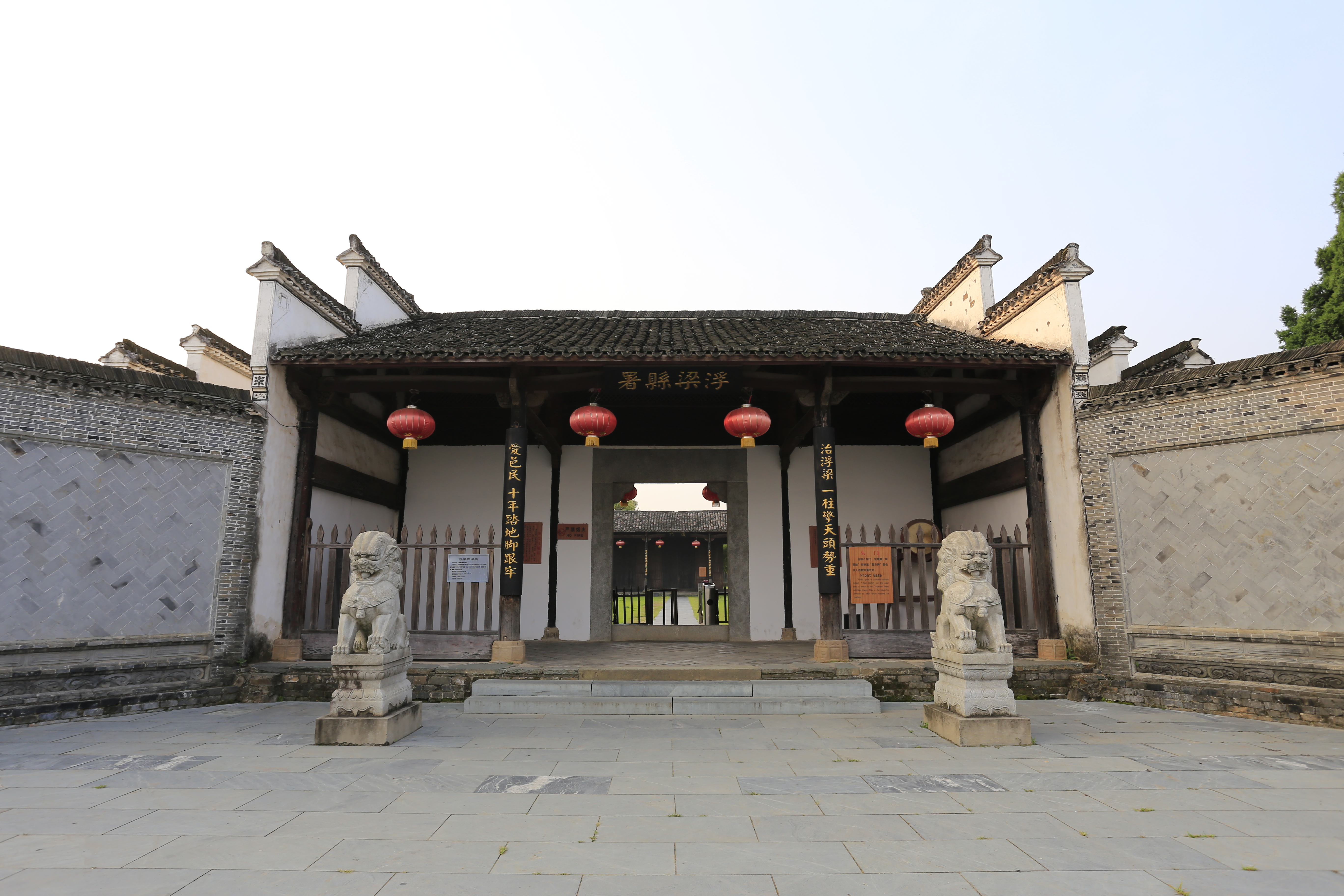 江西省景德镇市浮梁县旧衙门—— 大门